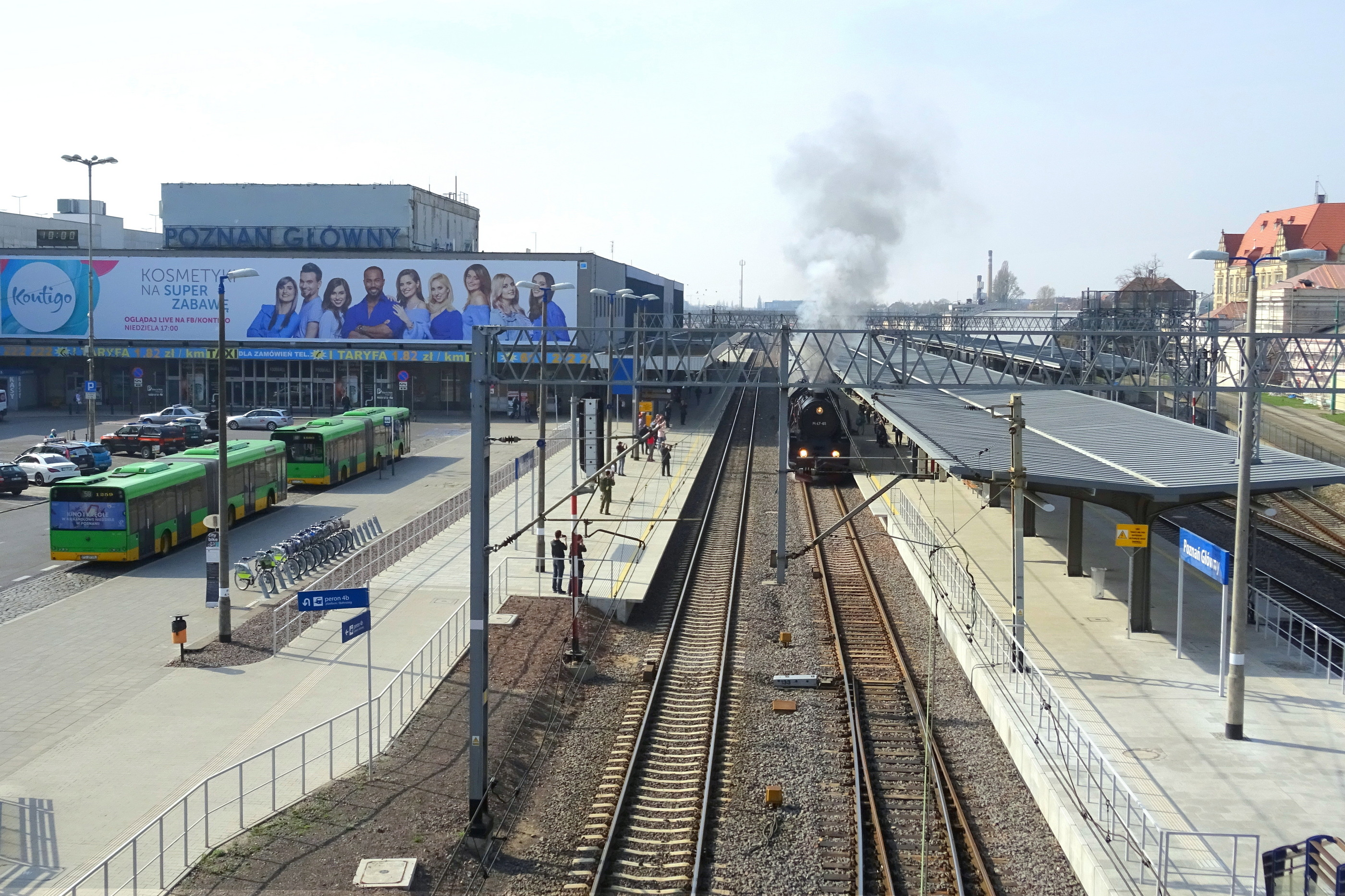 Pośpieszny parowóz Pt47 (parowozownia Wolsztyn) na stacji Poznań Główny, peron 5. (Po prawej stronie dworca znajdują się perony 4 i dalej 4a oraz 5 i 6).